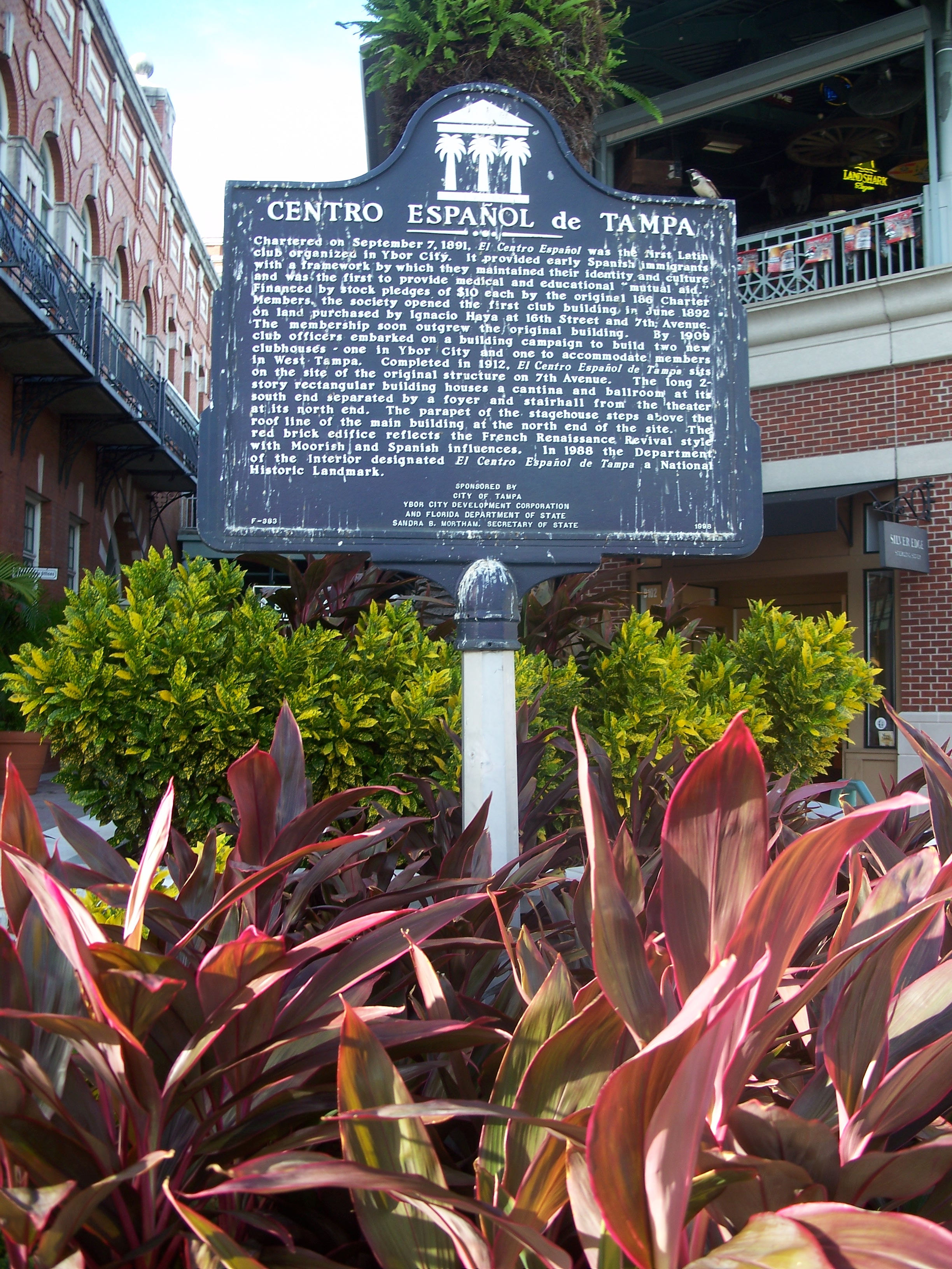 El Centro Espanol de Tampa, in Tampa, Florida